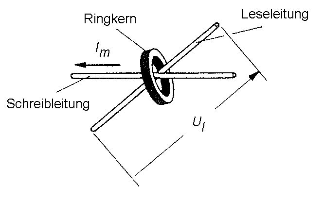 Schematischer Ringkernspeicher mit Schreib- und Leseleitung